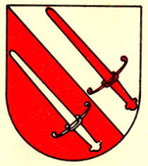 Wappen von Oulens Kanton Waadt Schweiz